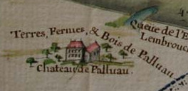 vue du Chateau_de_Palluau_en bordure de la Foret_d'Aumont.